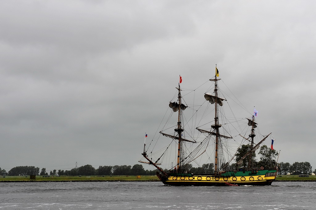 In 1703 maakte Tsaar Peter de Grote gebruik van zijn eigen ontwerp om zijn eerste schip voor de nieuwe Russische Marine te bouwen. Op 24 maart in dat jaar werd in St. Petersburg de kiel gelegd van het fregat “Shtandart” en de totale bouw van het schip duurde niet langer dan 5 maanden. De Tsaar werd zelf de eerste kapitein op het schip dat 16 jaar dienst deed als vlaggenschip van de Russische Marine. 300 jaar later, op 4 november 1994, werd in St. Petersburg de kiel gelegd voor de bouw van een exacte kopie van dat schip. In 1999 werd de replica te water gelaten.